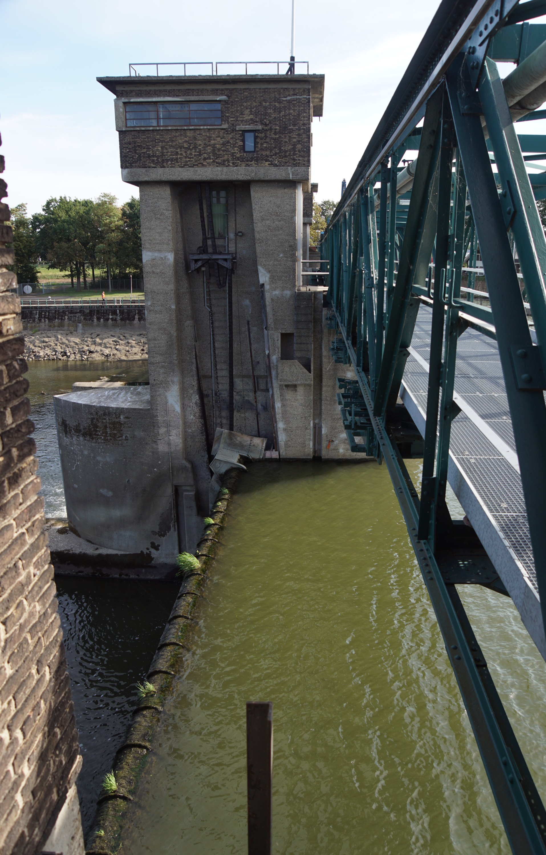 Stuw- en sluiscomplex Borgharen, Maastricht. Schuif, betonnen toren en loopbrug.